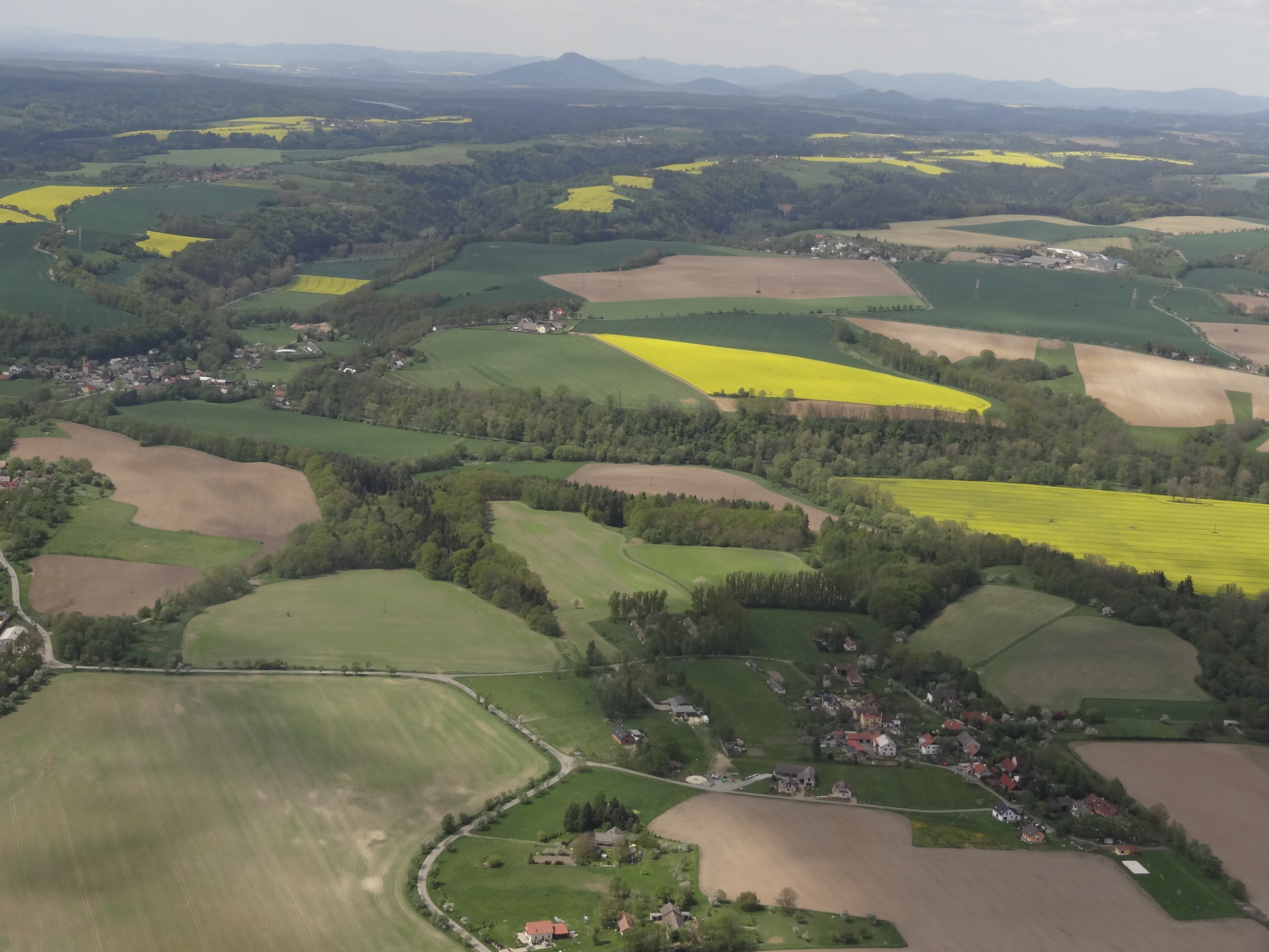 Dolení Kruhy a Mohelnice nad Jizerou (vlevo).JPG